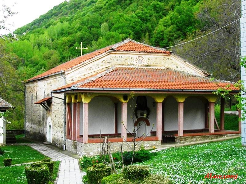 Св. Илија во Виничко Блатец